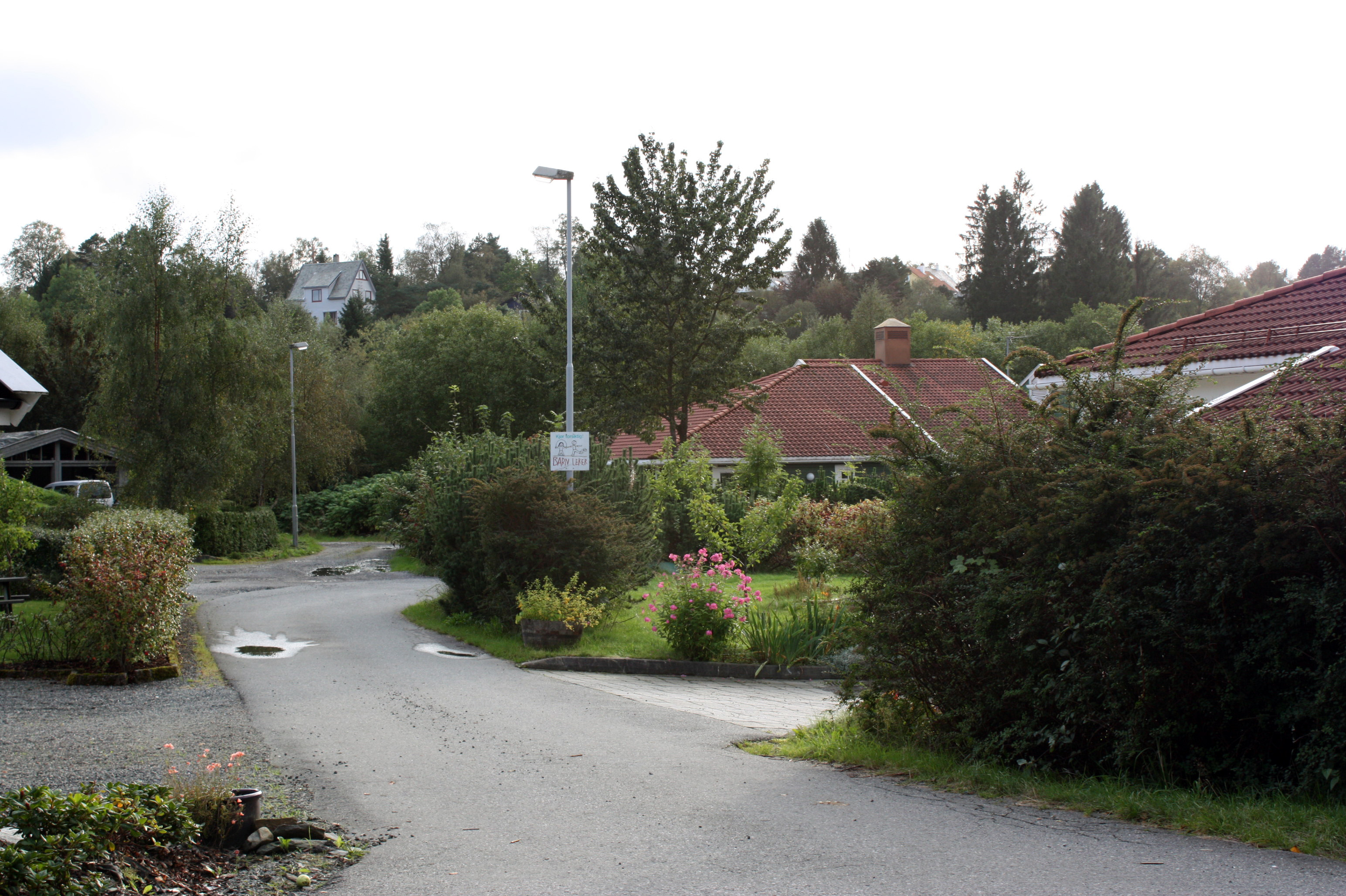 Kloppedalen, Fana, Bergen.